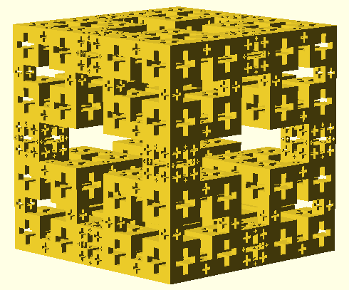 Rendu 3D du cube de Jérusalem à la troisième itération.